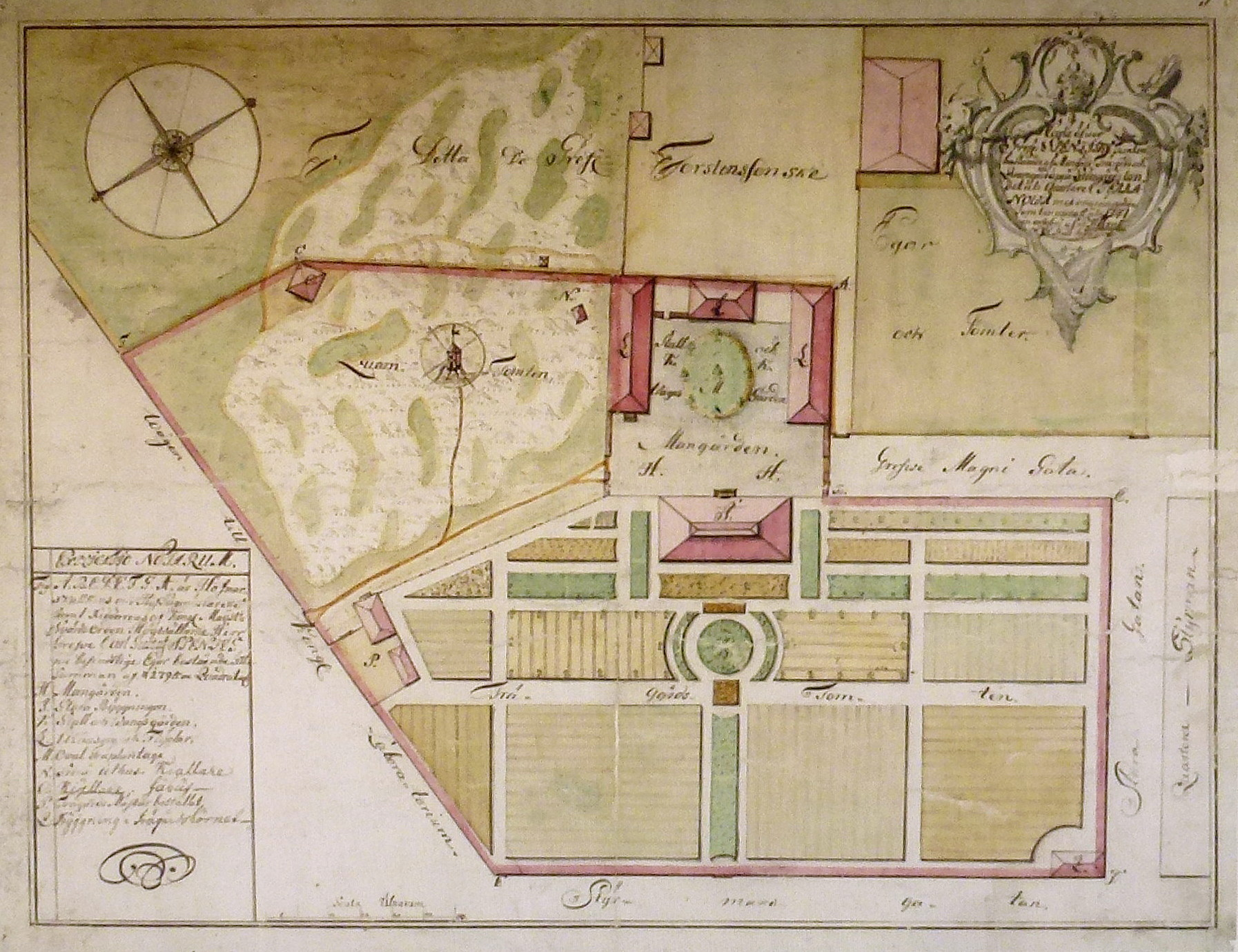 Den Oxenstiernska Malmgården gränsade mot Styrmansgatan, Storgatan och Greve Torstenssons Trädgård samt omgavs med murar och staket. Kvarnen Kurckan var uppkallad efter Gabriel Oxenstiernas hustru, som var född Brita Kurck (eller Kurk). Petrus Tillaeus ritade kartan 1747, norr är ner till vänster.